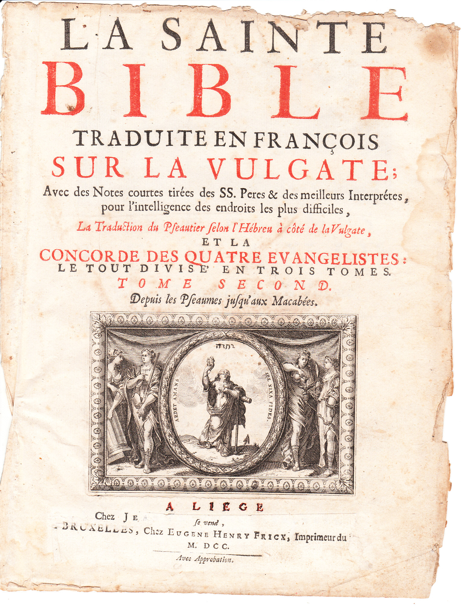 bible de l' année 1700